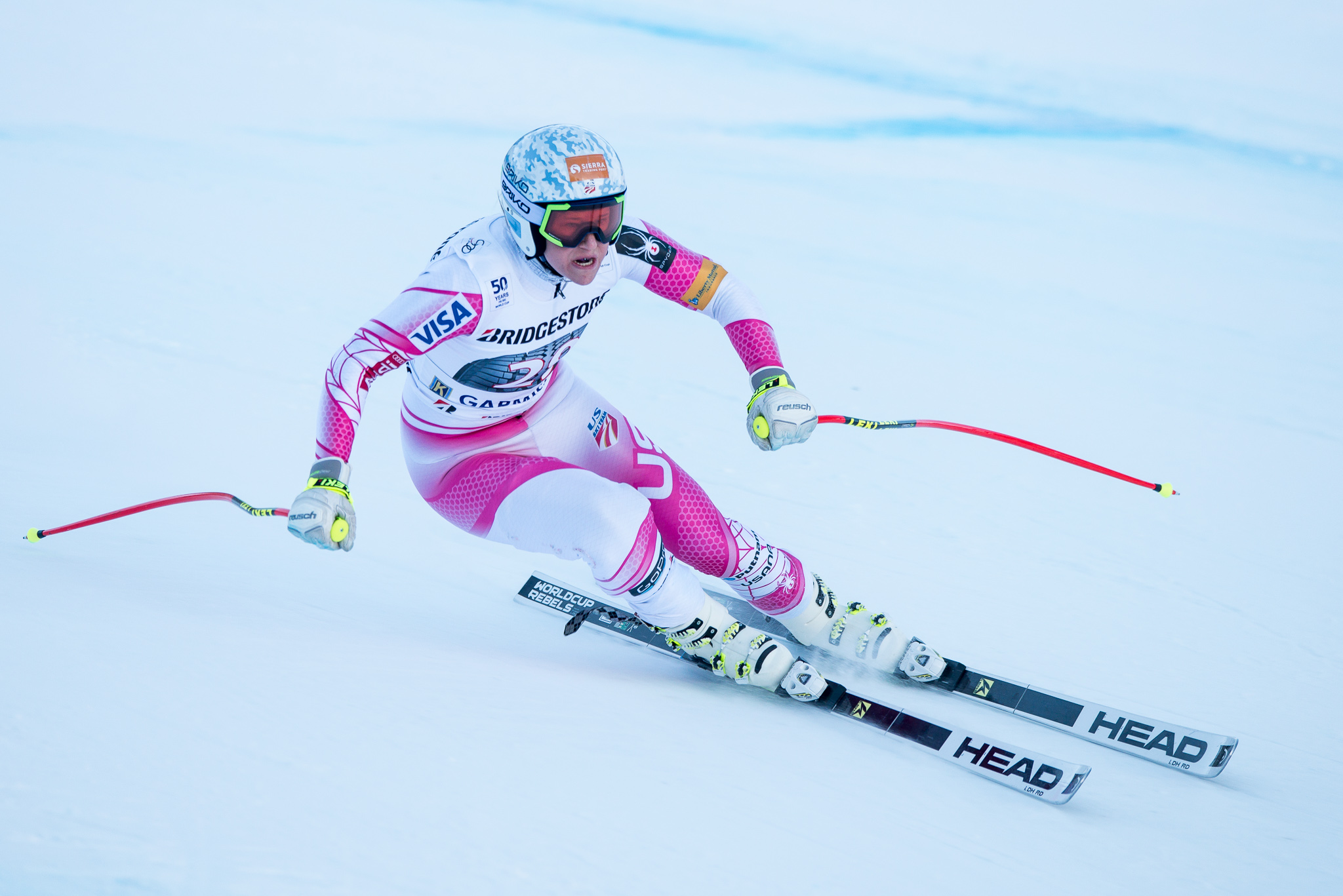 64. Kandahar Rennen,Alice McKennis,Audi FIS Ski Weltcup Garmisch-Partenkirchen,Damen Abfahrt,Kandahar,Ladies Downhill